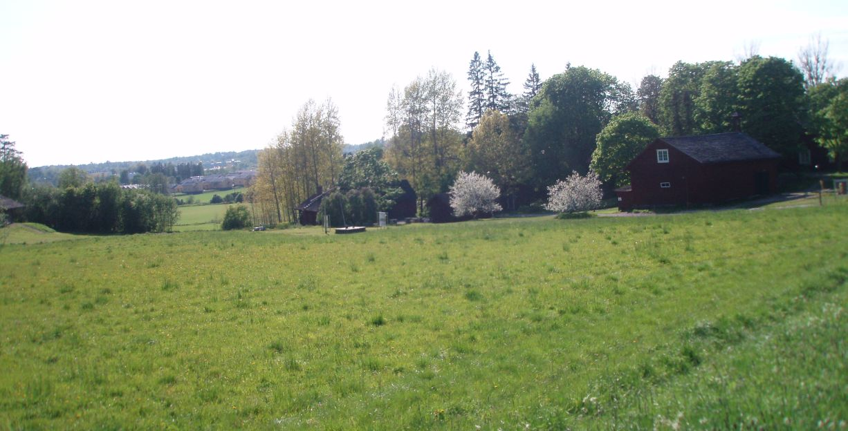 Glims agricultural museum in Espoo, Finland